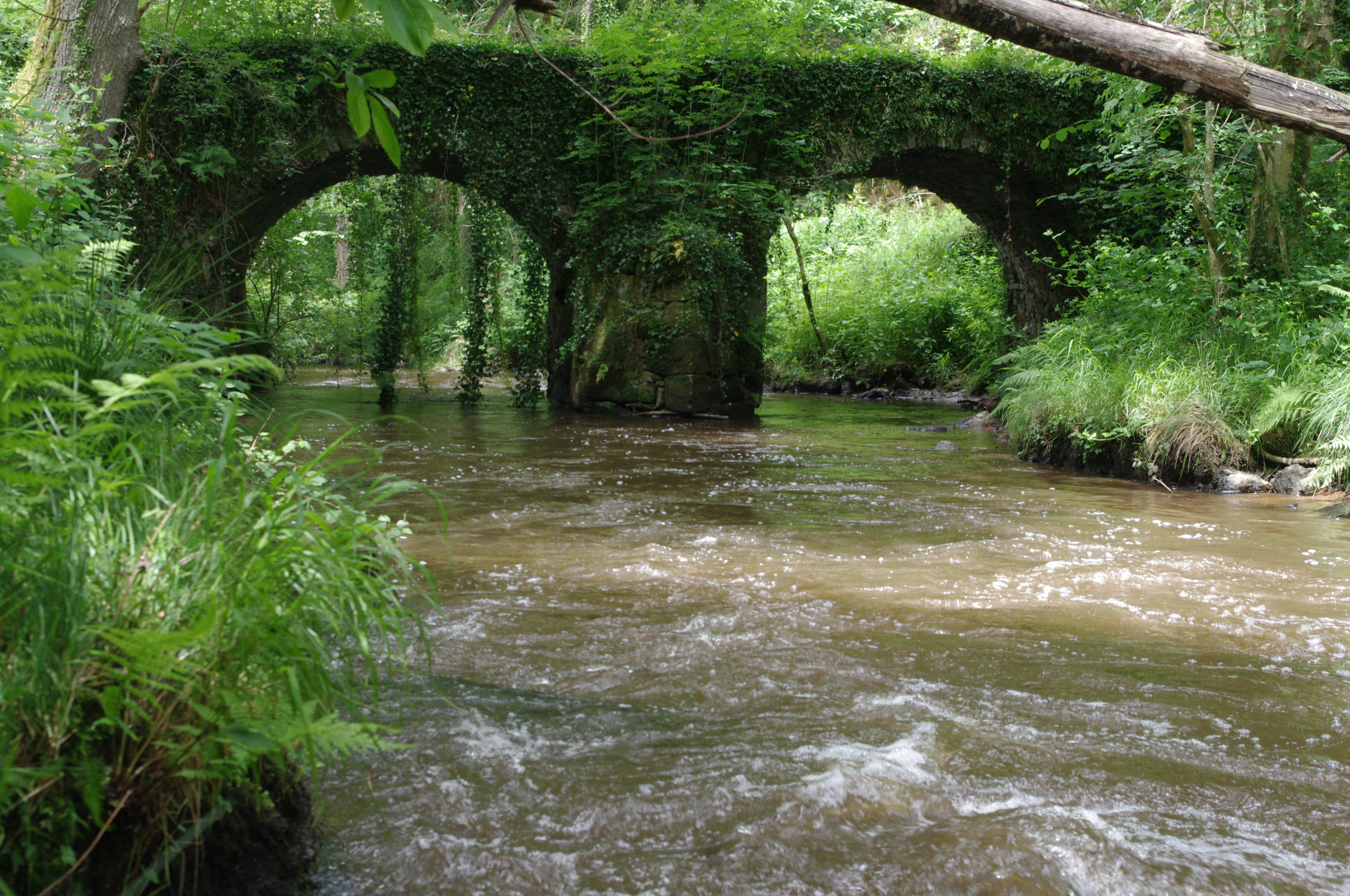 Le pont du Moulin du Pont, aussi appelé localement "pont romain" sur la Tardoire, à la limite de Saint-Mathieu et Saint-Bazile, Haute-Vienne, France. Vue depuis la rive côté St Matieu.